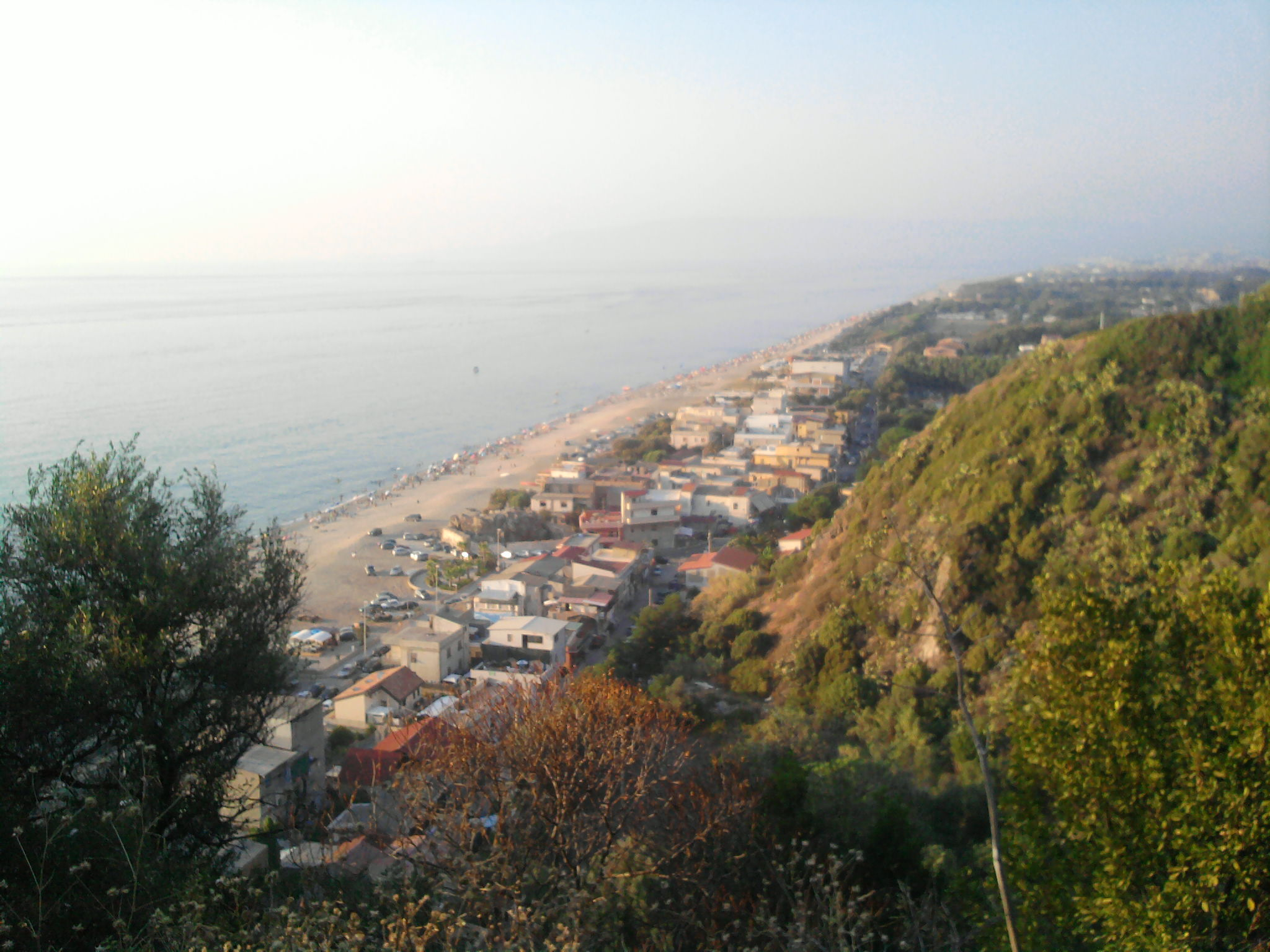 Borgo marinaro di Pietrenere di Palmi con foto scattata dal pianoro di Taureana